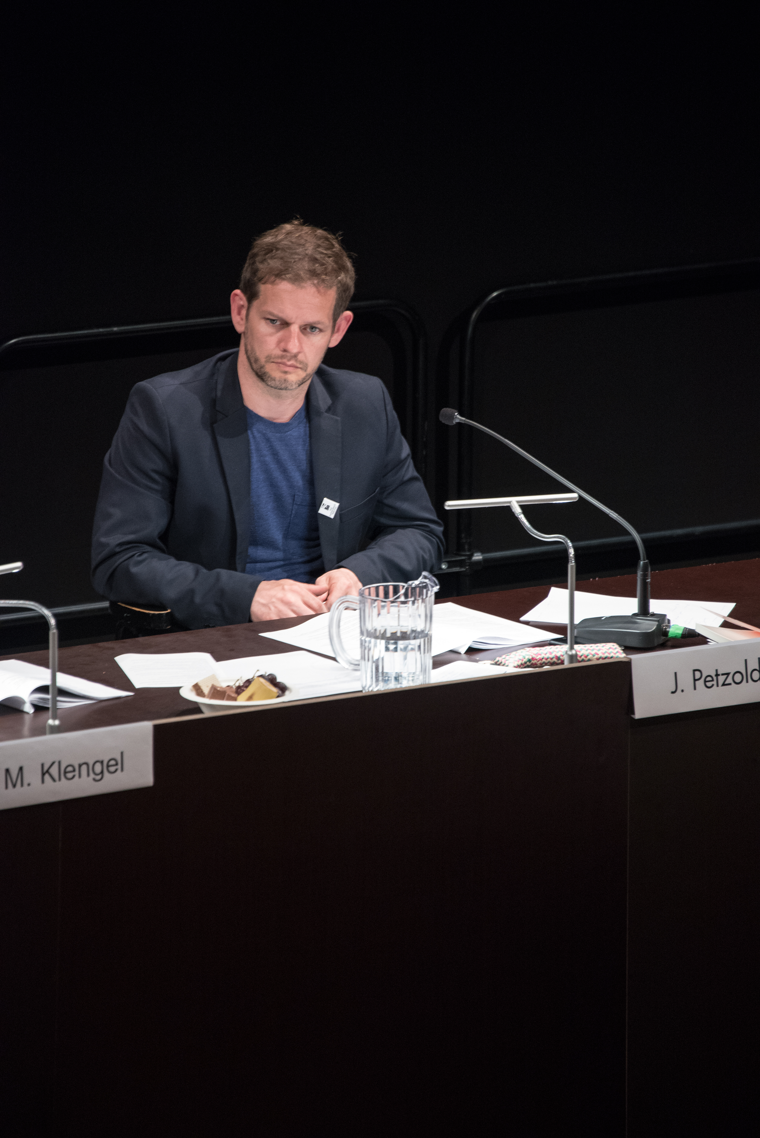 Das Kapitalismustribunal, Brut, 2016